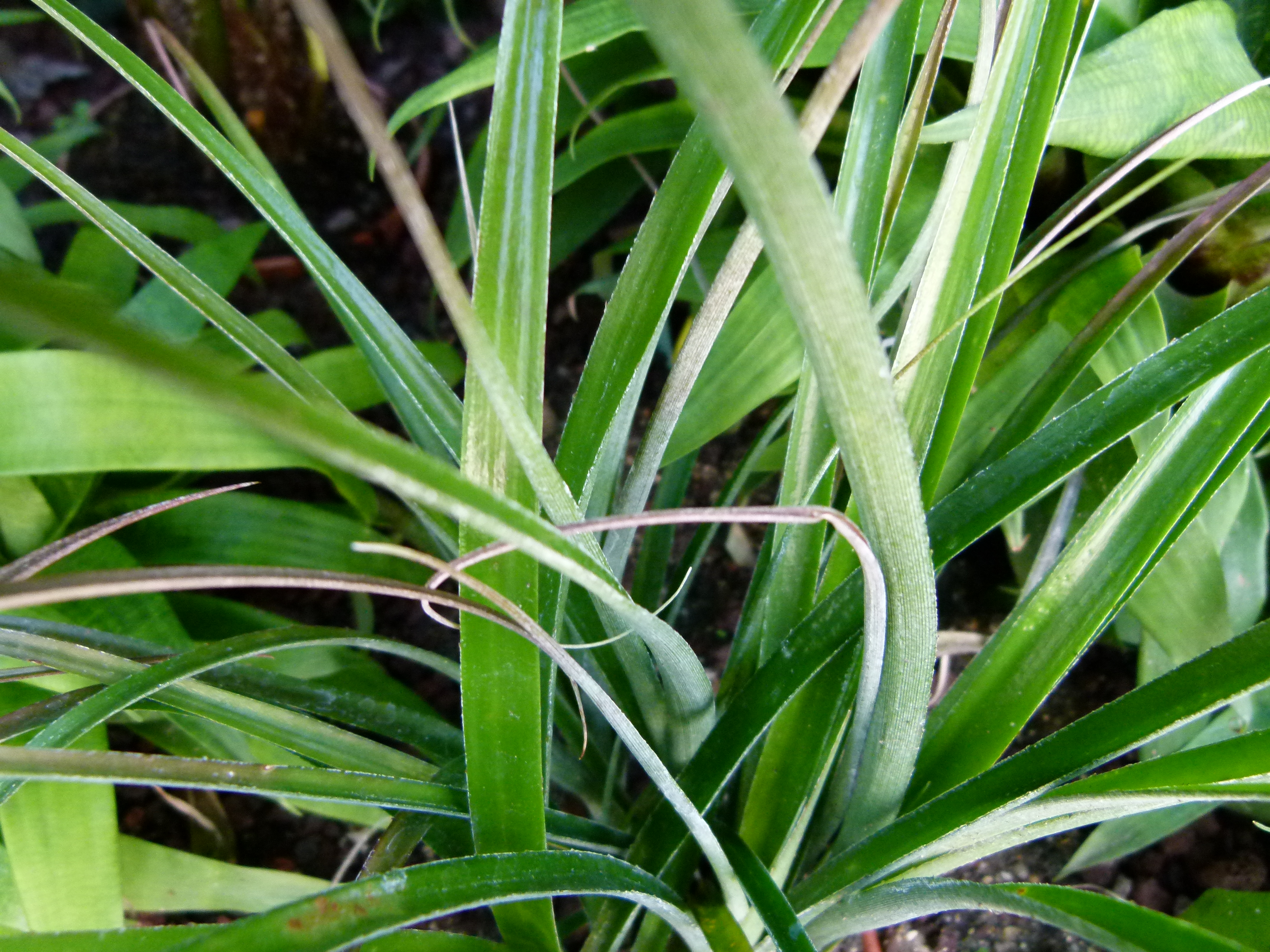 Billbergia nutens